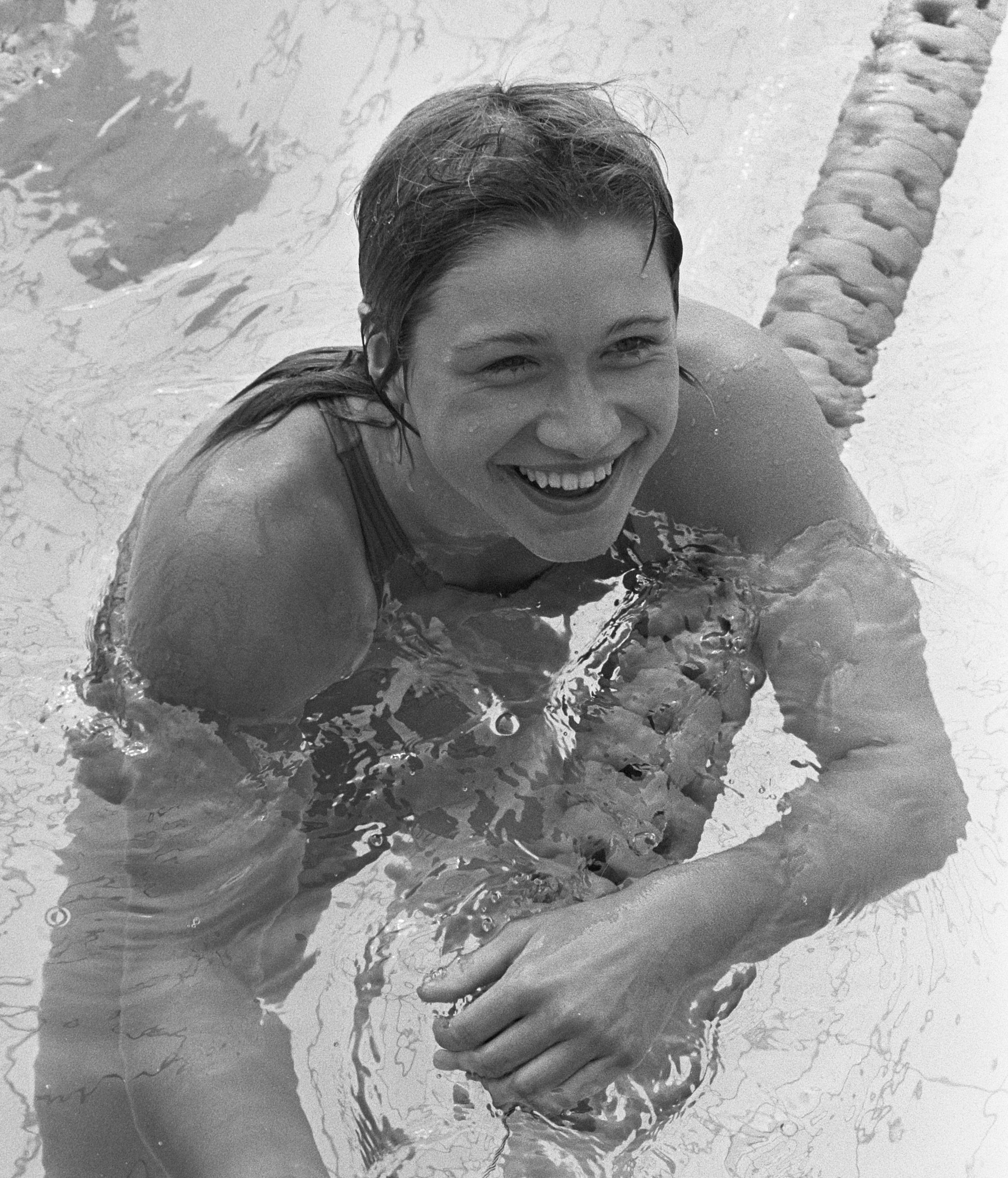 Ulrike Richter